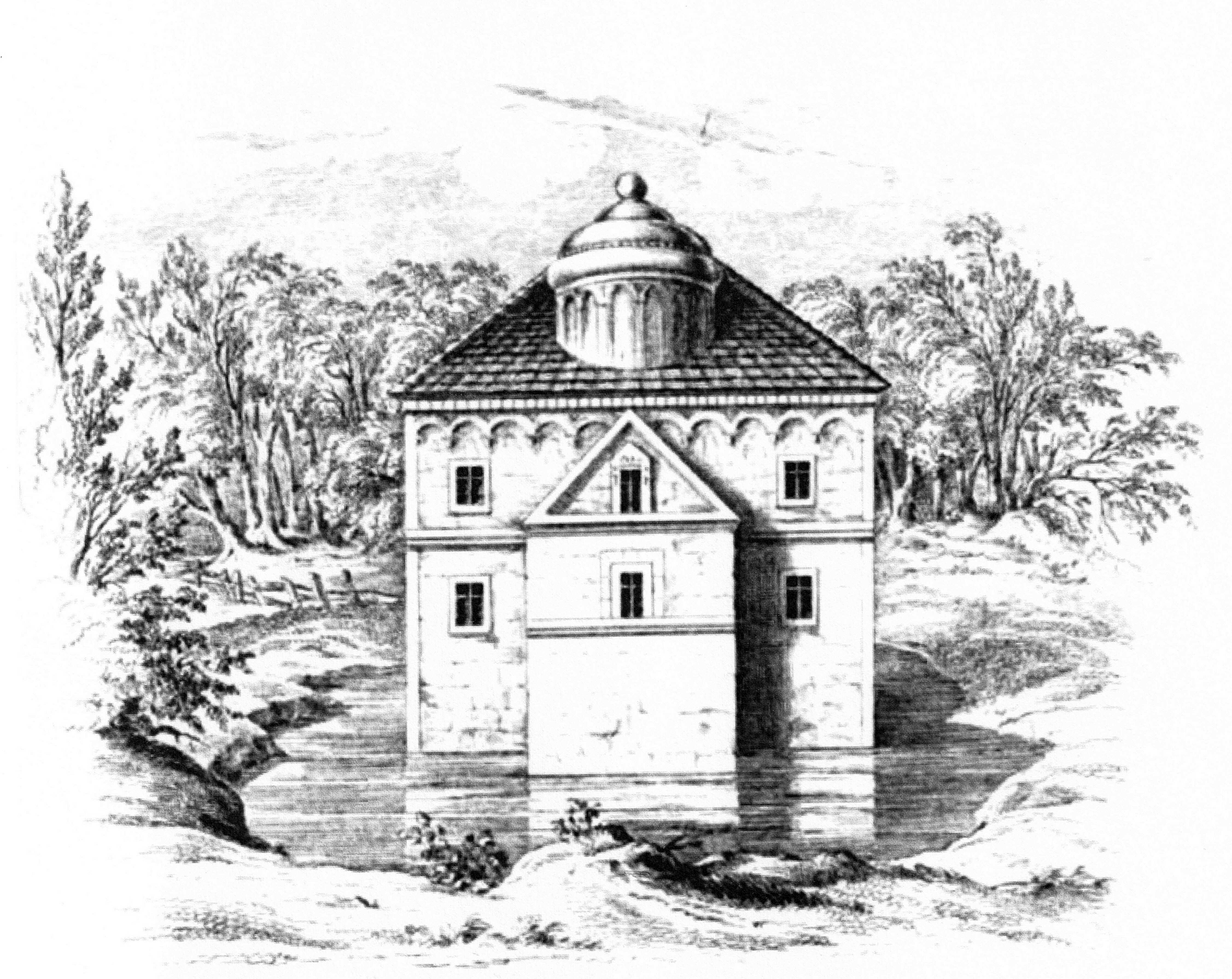 Das alte HerrenhausSeekamp (heute zu Schilksee), Zeichnung von Köhler und Roisternitz 1862